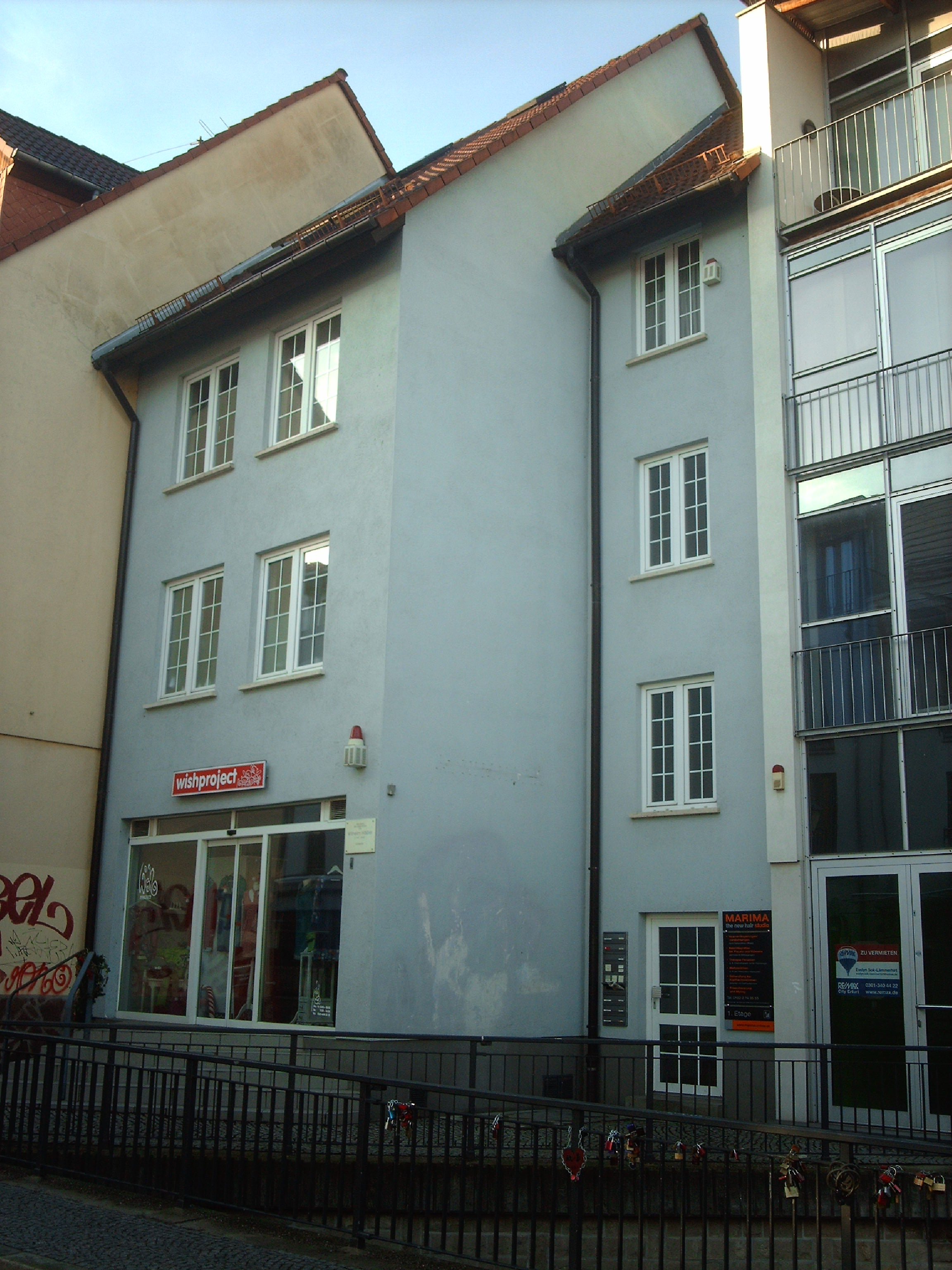 Geburtshaus des Komponisten Johann Wilhelm Häßler auf der Langen Brücke in Erfurt.